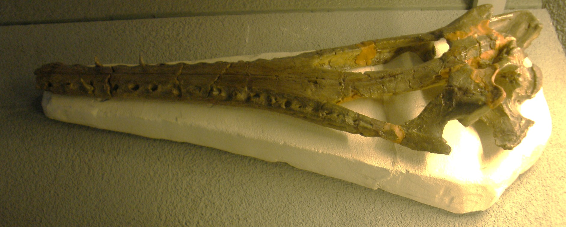 Fossil of Thoracosaurus, an extinct crocodile - Took the photo at Naturalis museum, Leiden